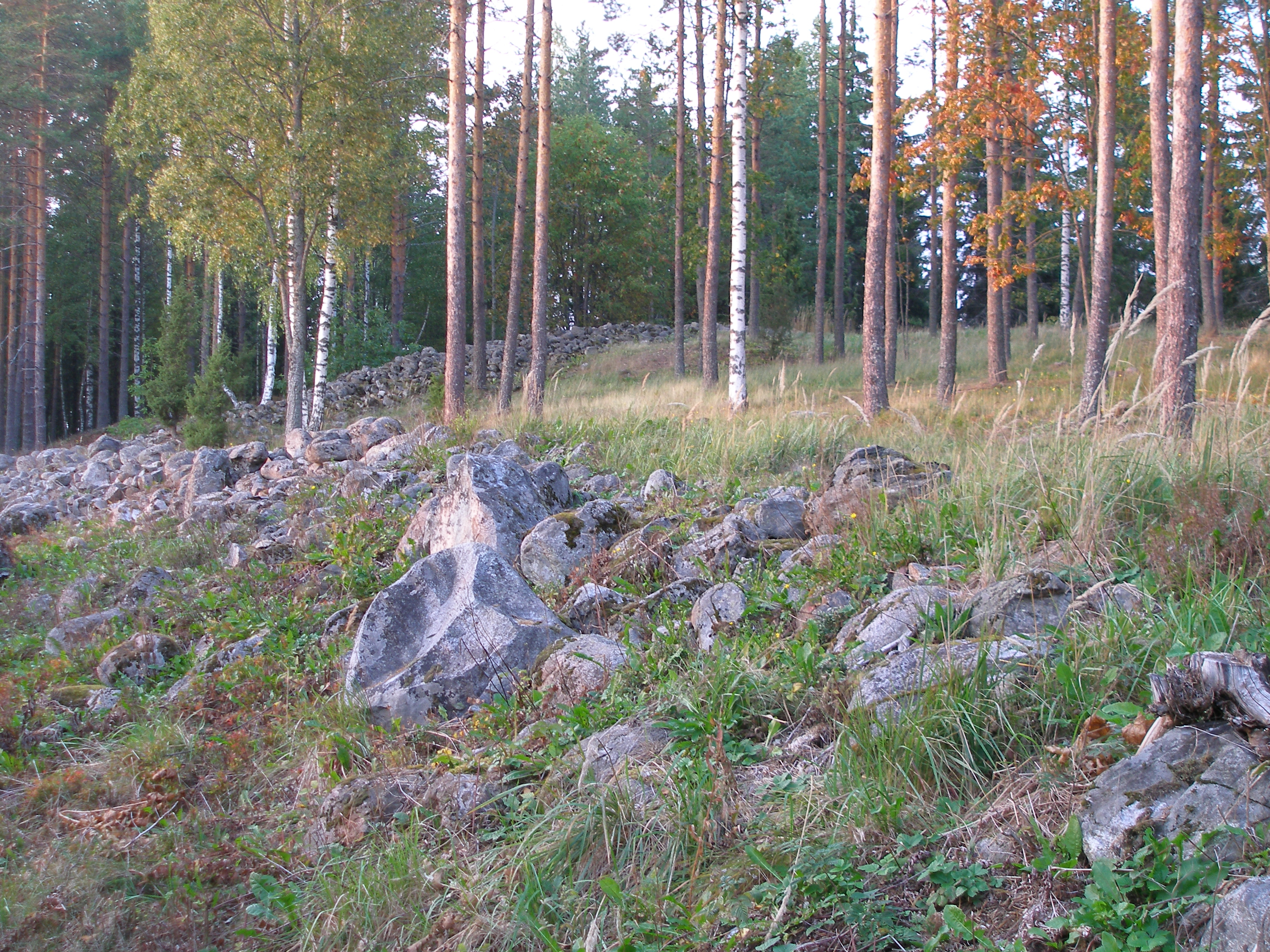 Rapola Castle